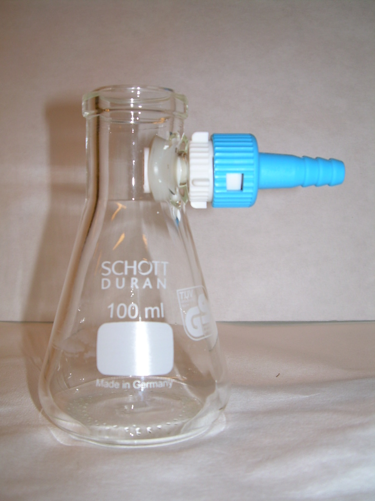 Sugekolbe Büchner flask